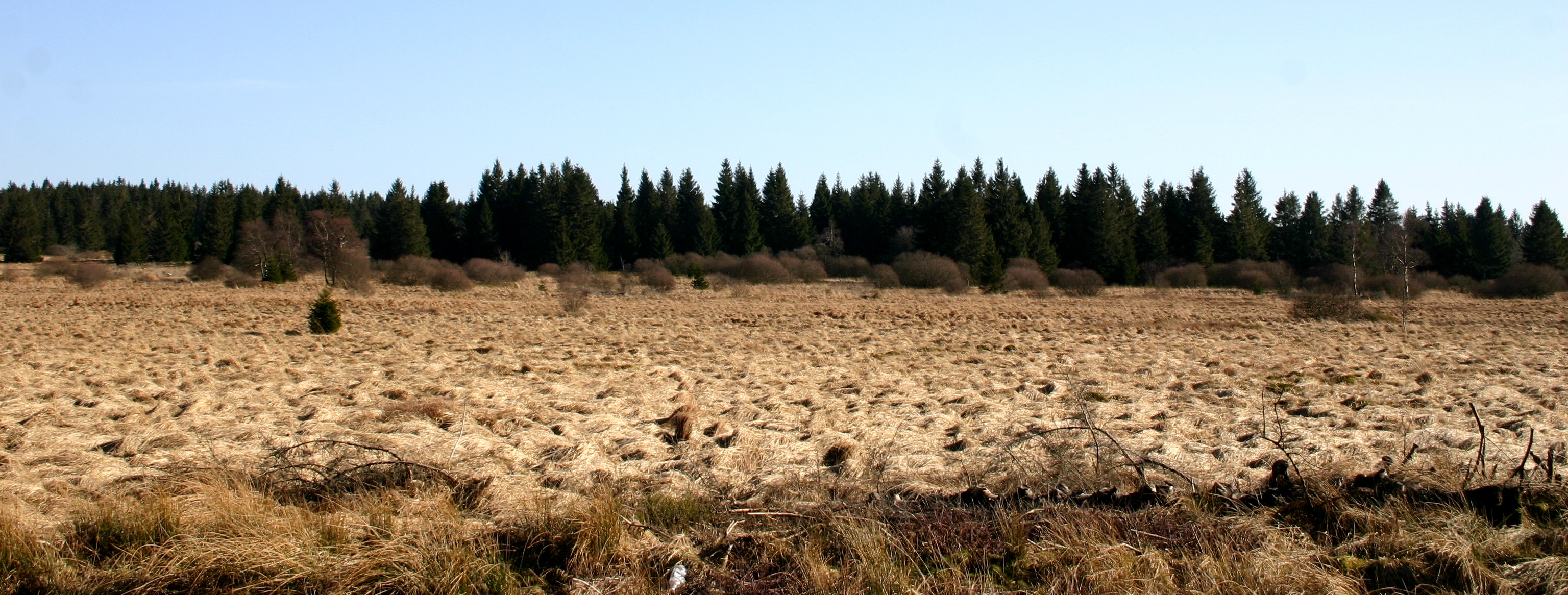 Fagne de Neûr Lowé Februar 2008.